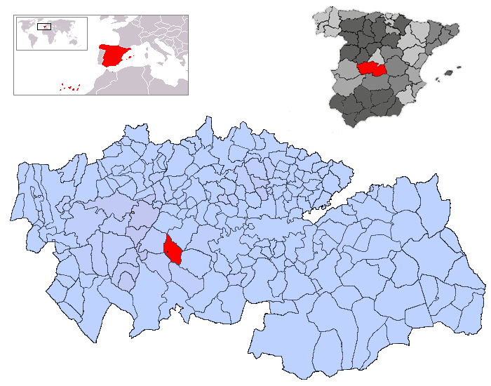 Villarejo de Montalbán en la provincia de Toledo